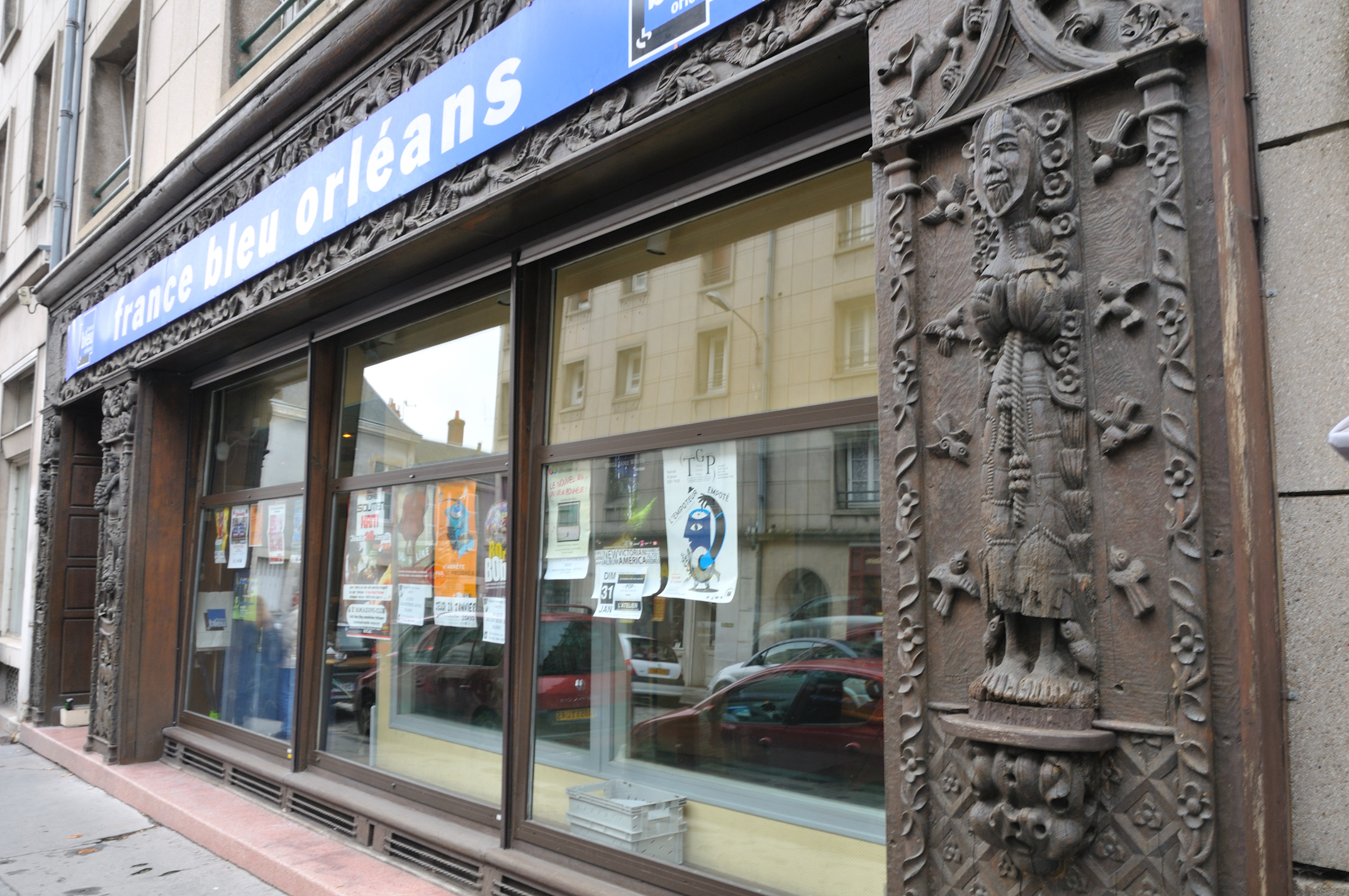 Ancien bâtiment de France Bleu Orléans, 8 rue d'Illiers, Orléans, Loiret, France (jusqu'en 2012)